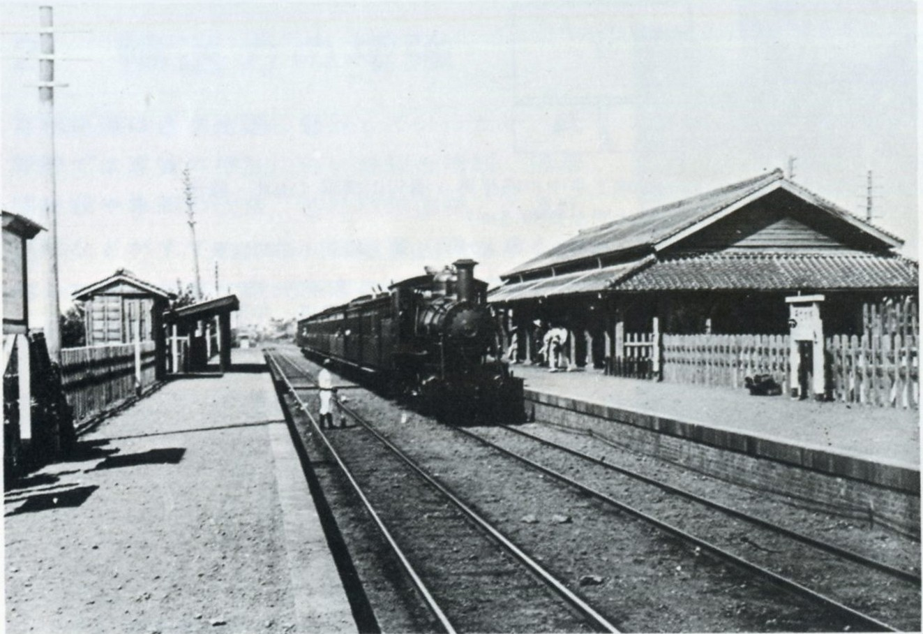 開業当時の茅ヶ崎駅(神奈川県茅ヶ崎市、東海道本線)